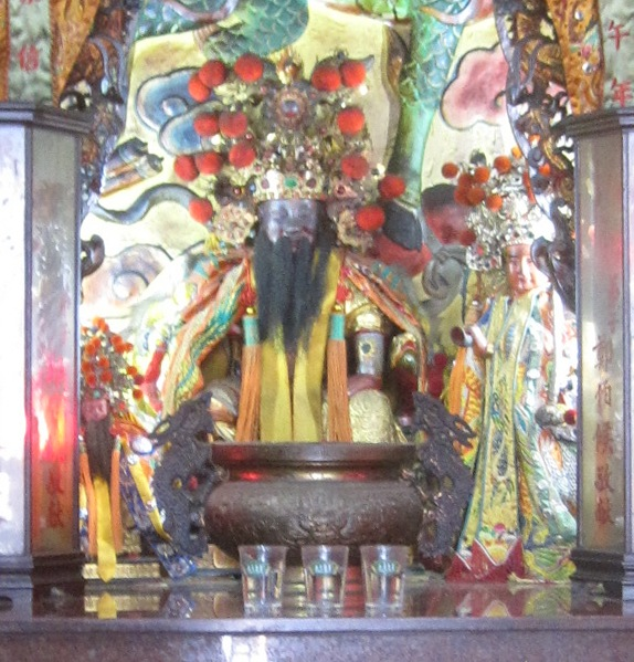 大灣國聖宮謝府千歲與鄭壇尊王